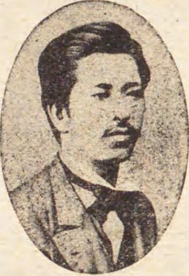 壮年の頃の田口卯吉